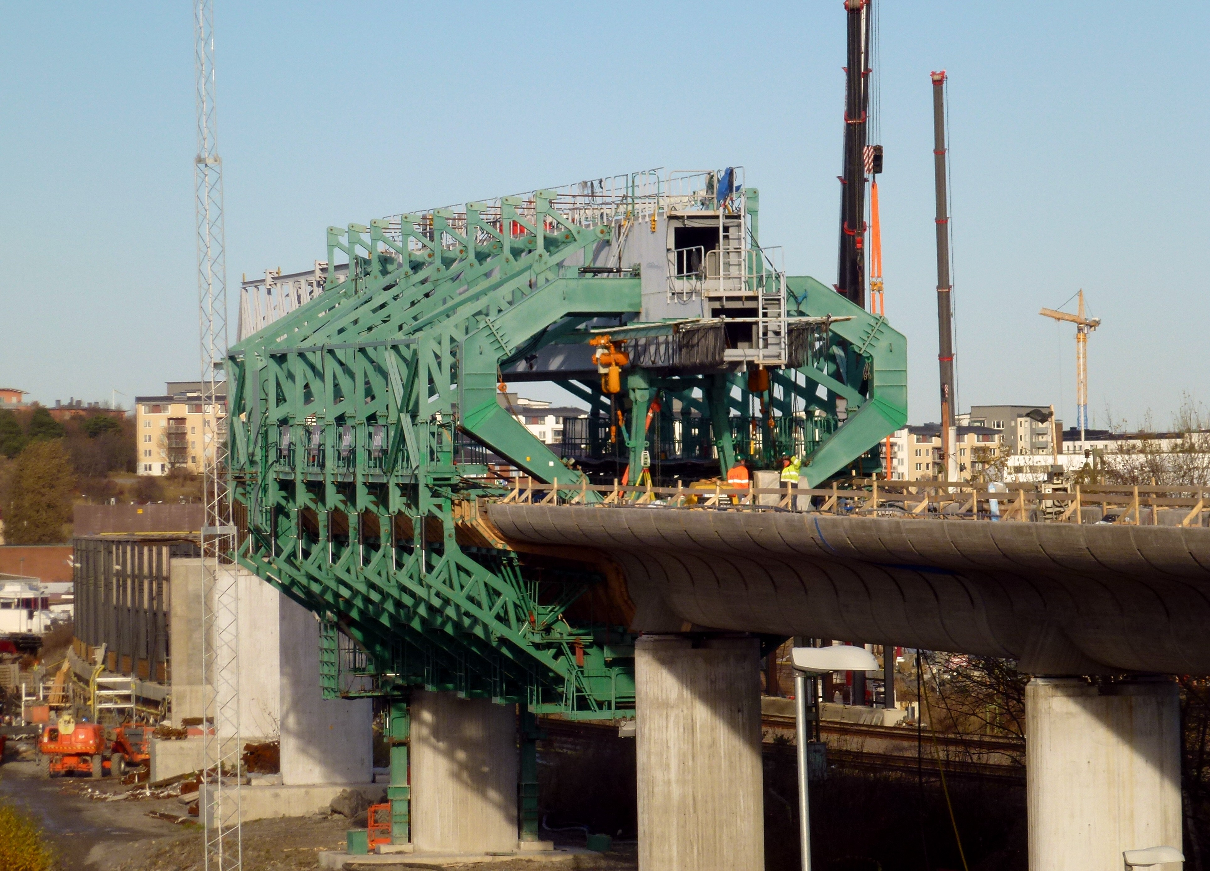 Järnvägsbron Årsta-Älvsjö, formvagnen vid Älvsjö